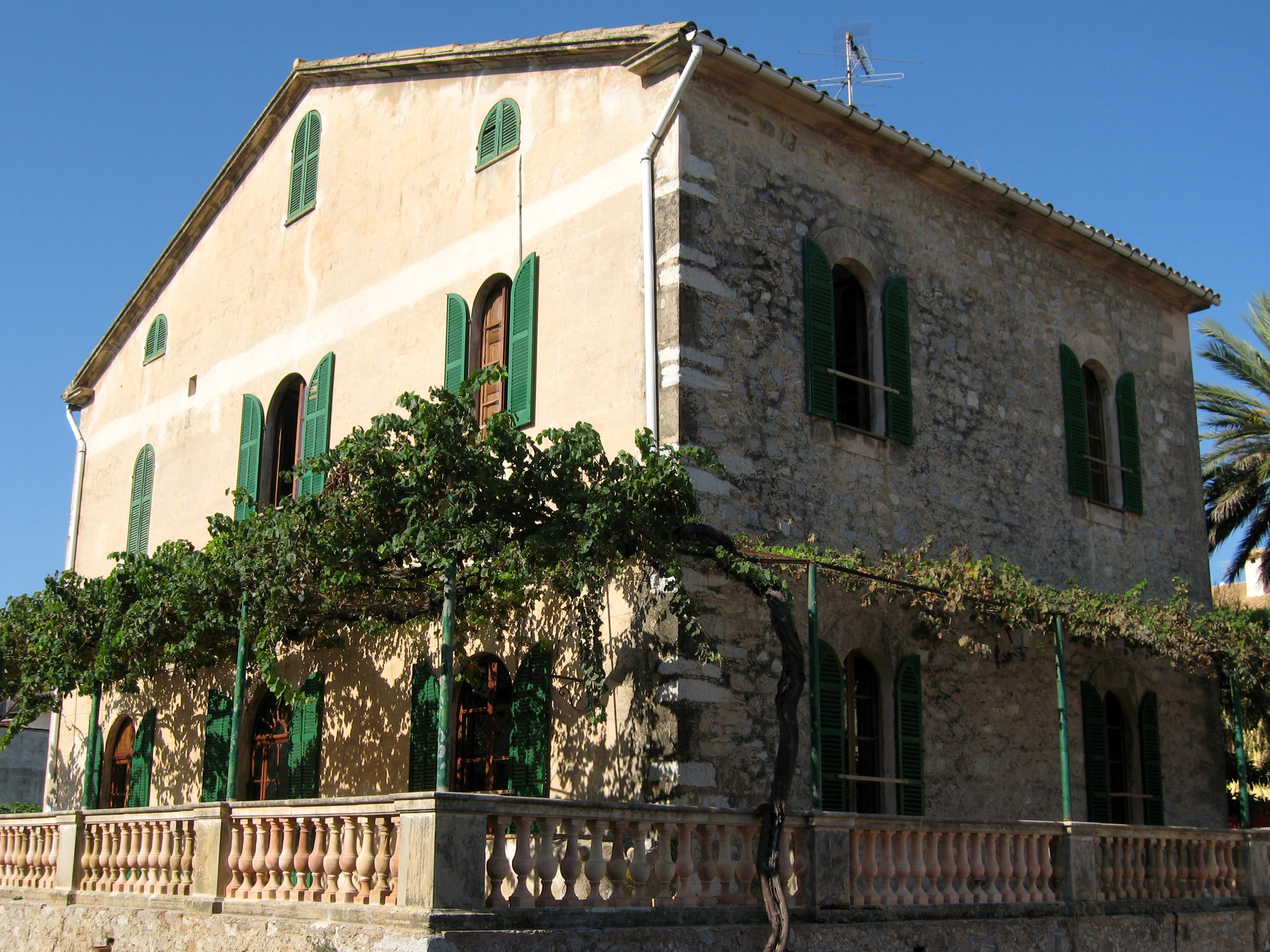 Herrenhaus Na Batlessa in Artà, Mallorca, Spanien